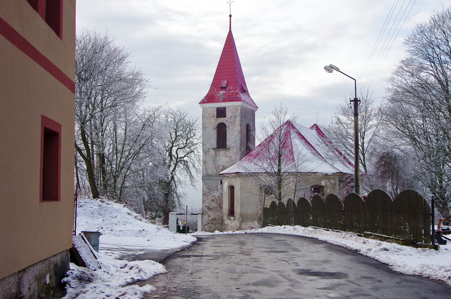 Kostel sv. Josefa (Krásná Lípa), Krásná Lípa